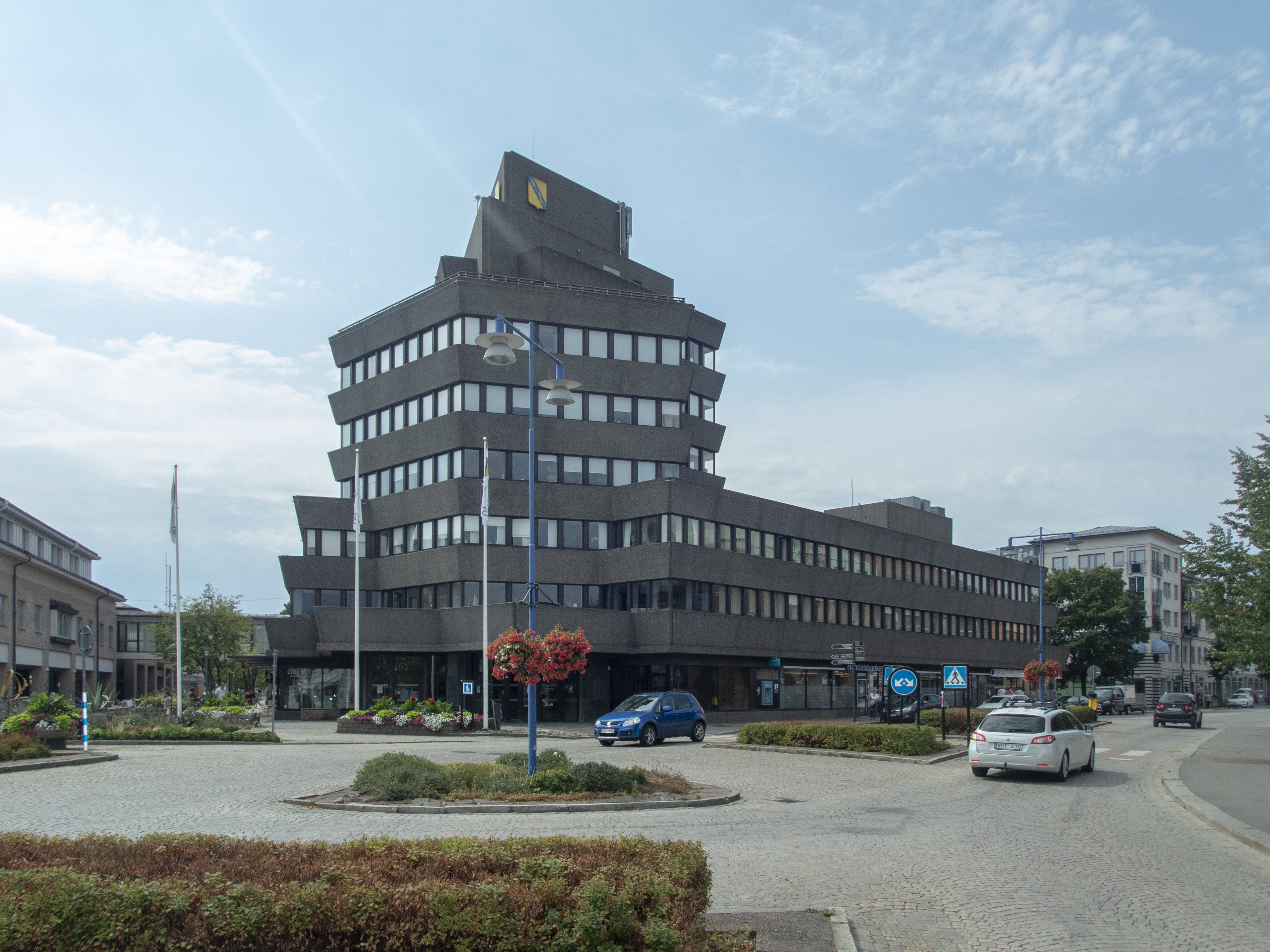 Stadshuset i Vetlanda. Byggnadsår 1967–70. Arkitekt Bent Jörgen Jörgensen